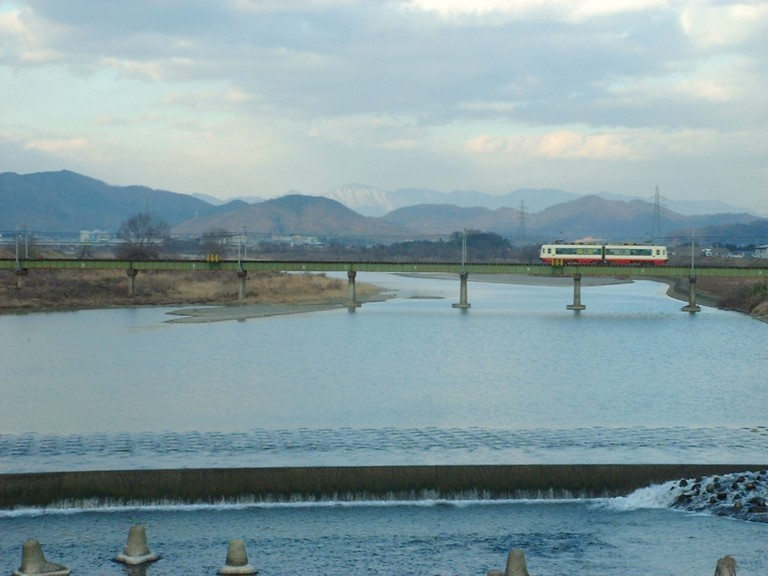 根尾川を渡る名鉄揖斐線 政田～下方